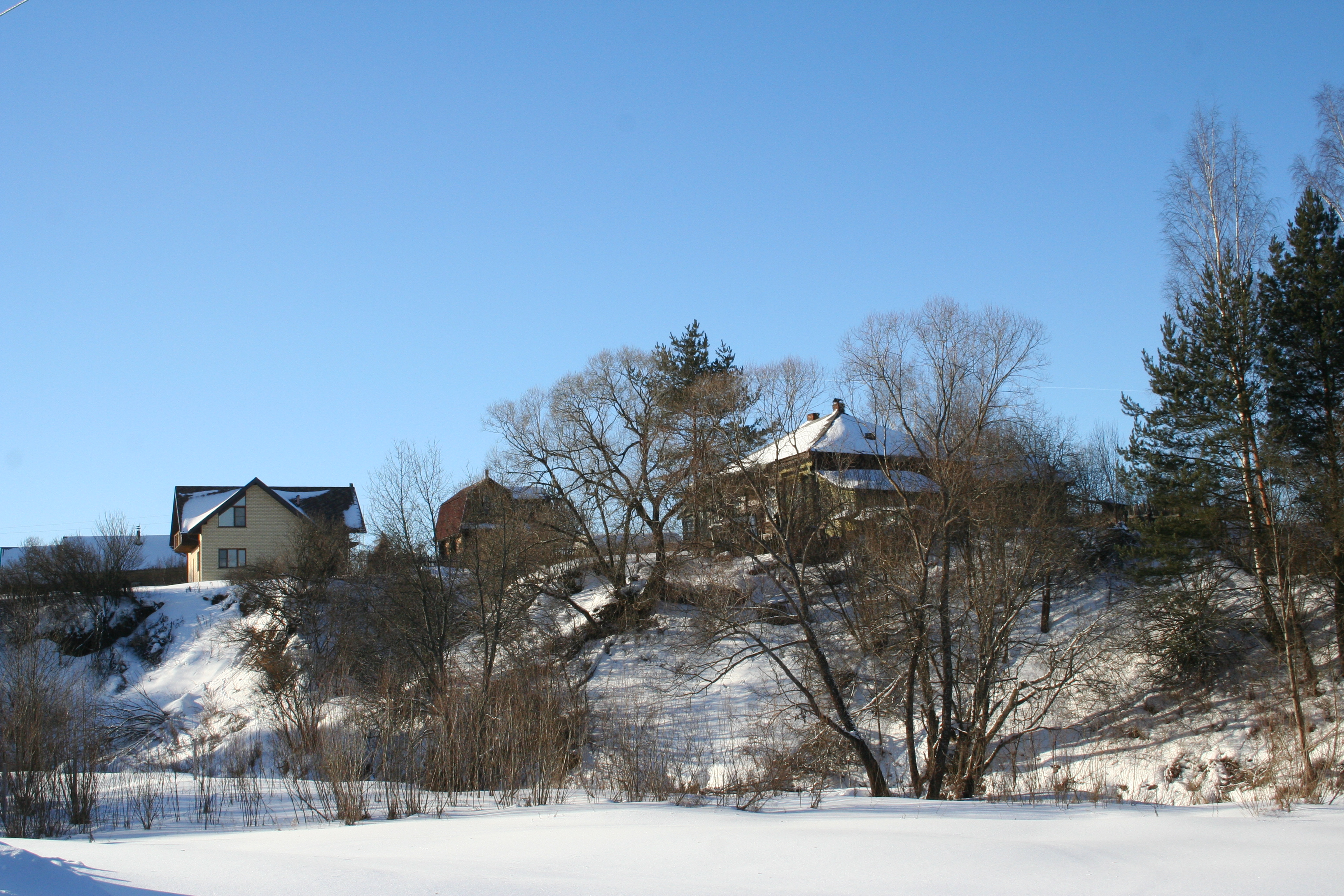 Посёлок Кстово Рыбинского района Ярославской области. Дома над рекой Черёмуха